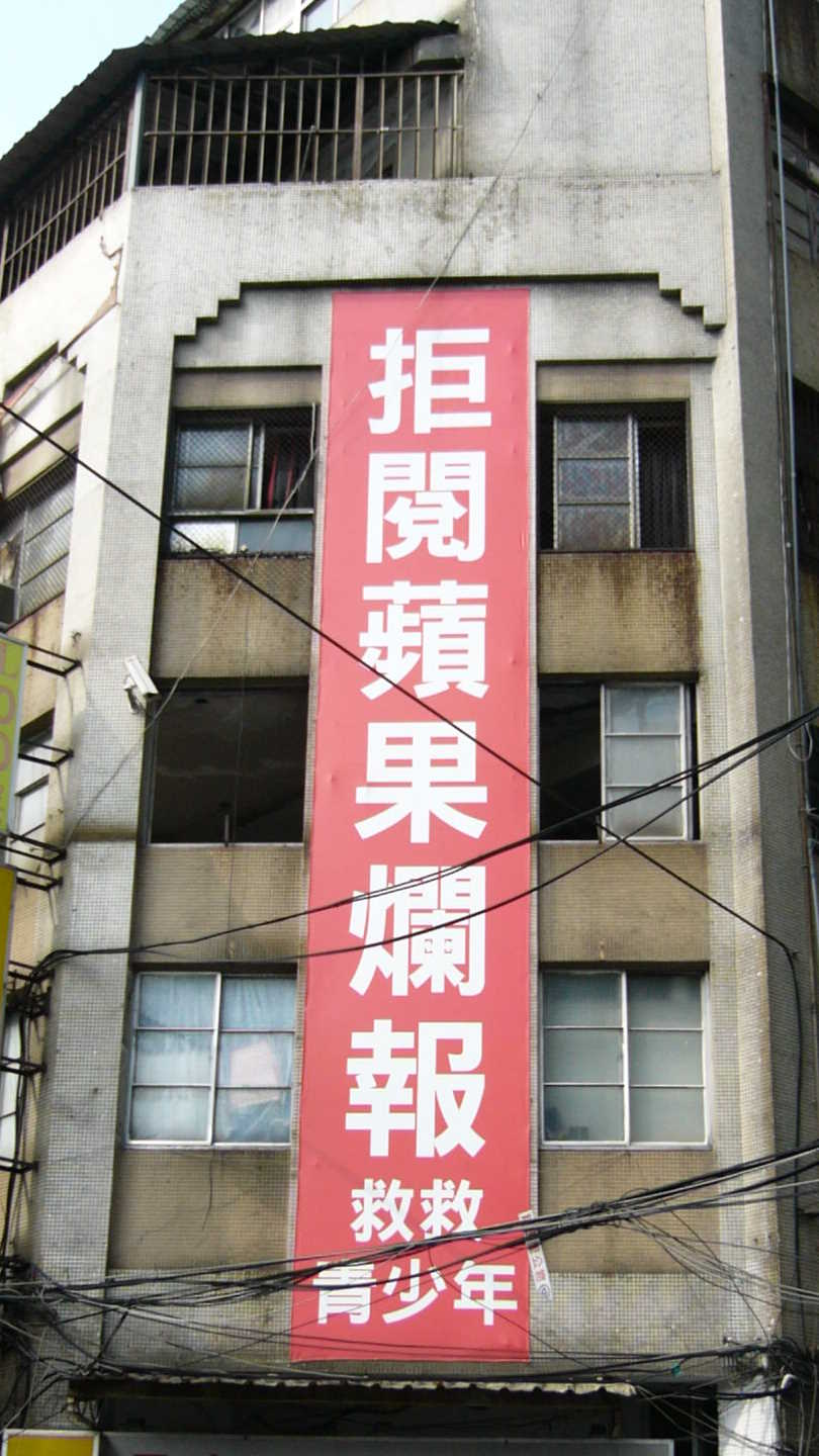 臺北市大同區華陰街老舊公寓外牆懸掛的布條「拒閱蘋果爛報，救救青少年」，號召民眾拒閱《蘋果日報》。2017年重訪時已撤除。